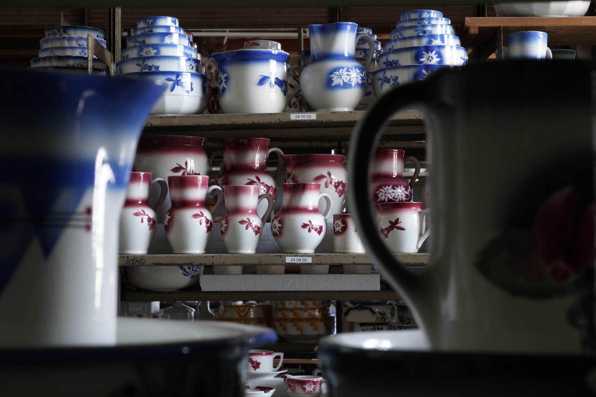 Geschirr-Museum Steingut Schaudepot